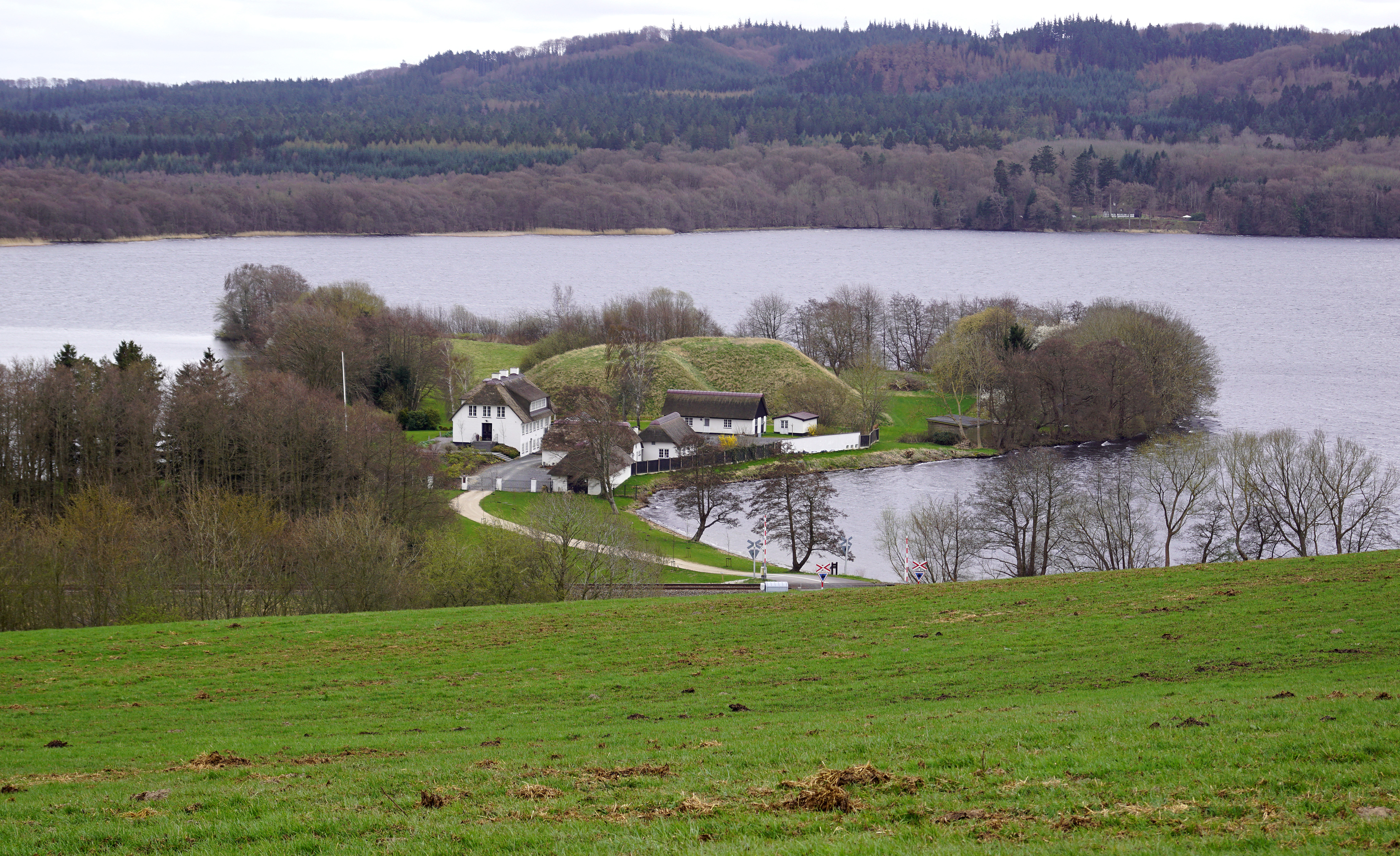 Dynæs i Julsø